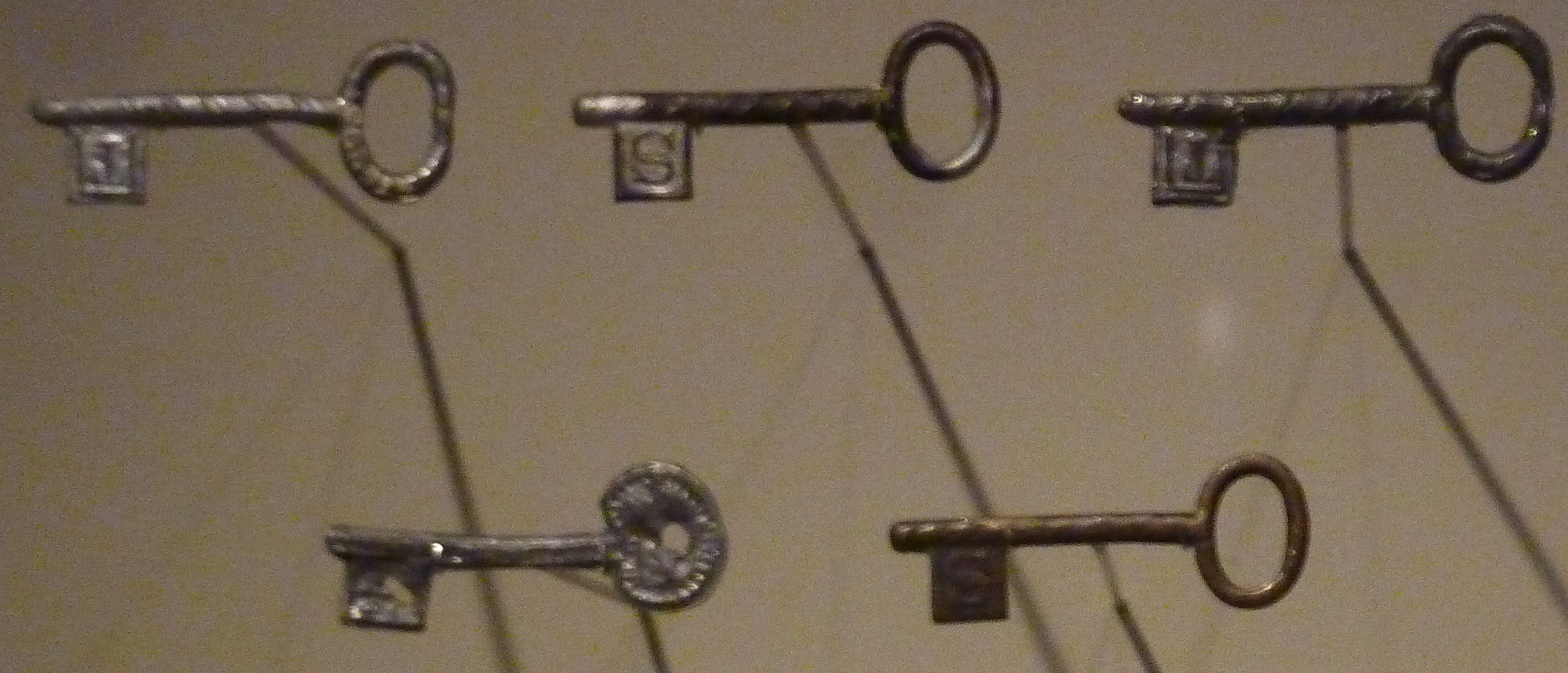 Clefs de Saint-Tugen (en plomb, fin XIXe, collection MUCEM, Marseille) ; ces petites clefs étaient vendues lors du pardon de Saint-Tugen le troisième dimanche de juin. Ces souvenirs de pèlerinage pouvaient être jetées devant soi face à un chien présumé enragé : si l'animal était malade, il se couchait immédiatement et on avait le temps de fuir. Les pains piqués avec la clef du saint avaient la réputation de protéger contre la rage ceux qui en mangeaient.